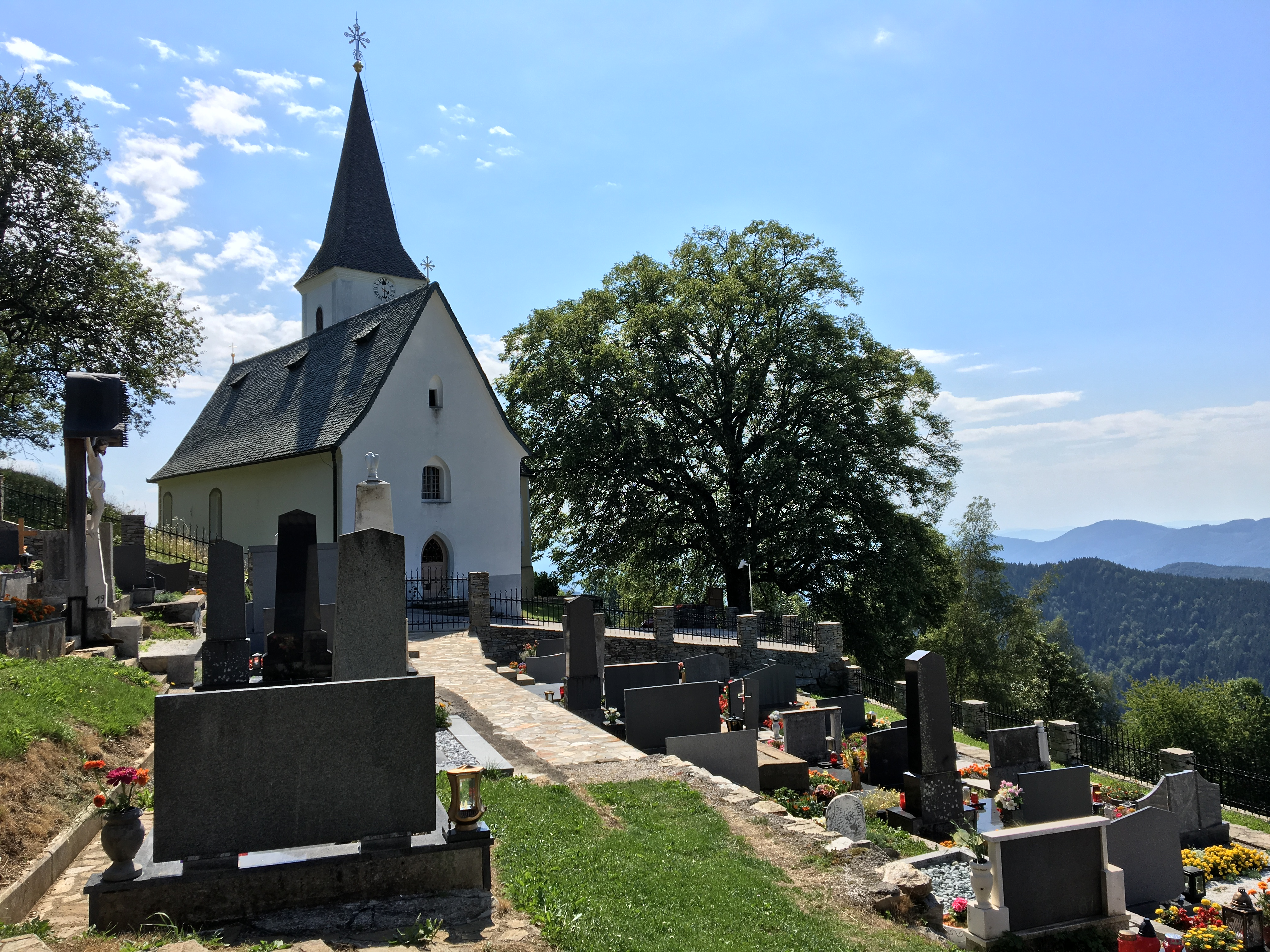 Skomarje ve Slovinsku - kostel sv. Lamberta